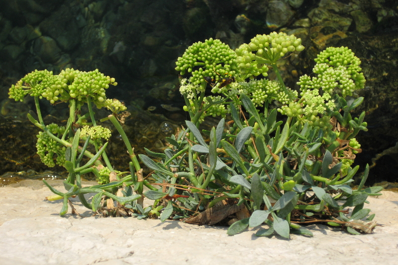 Motar (Crithmum maritimum) u Hrvatskom primorju